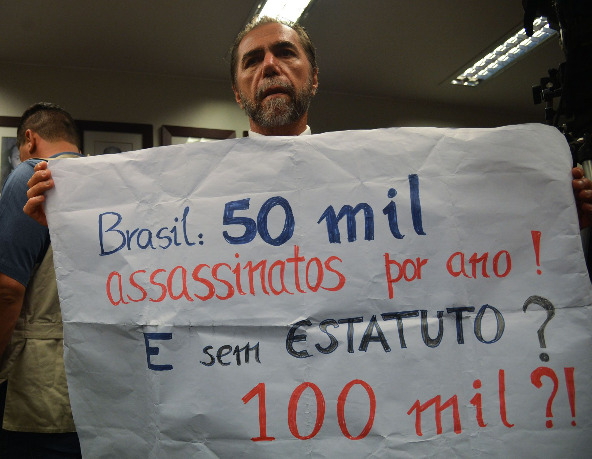 Manifestante contrário à revogação do Estatuto do Desarmamento